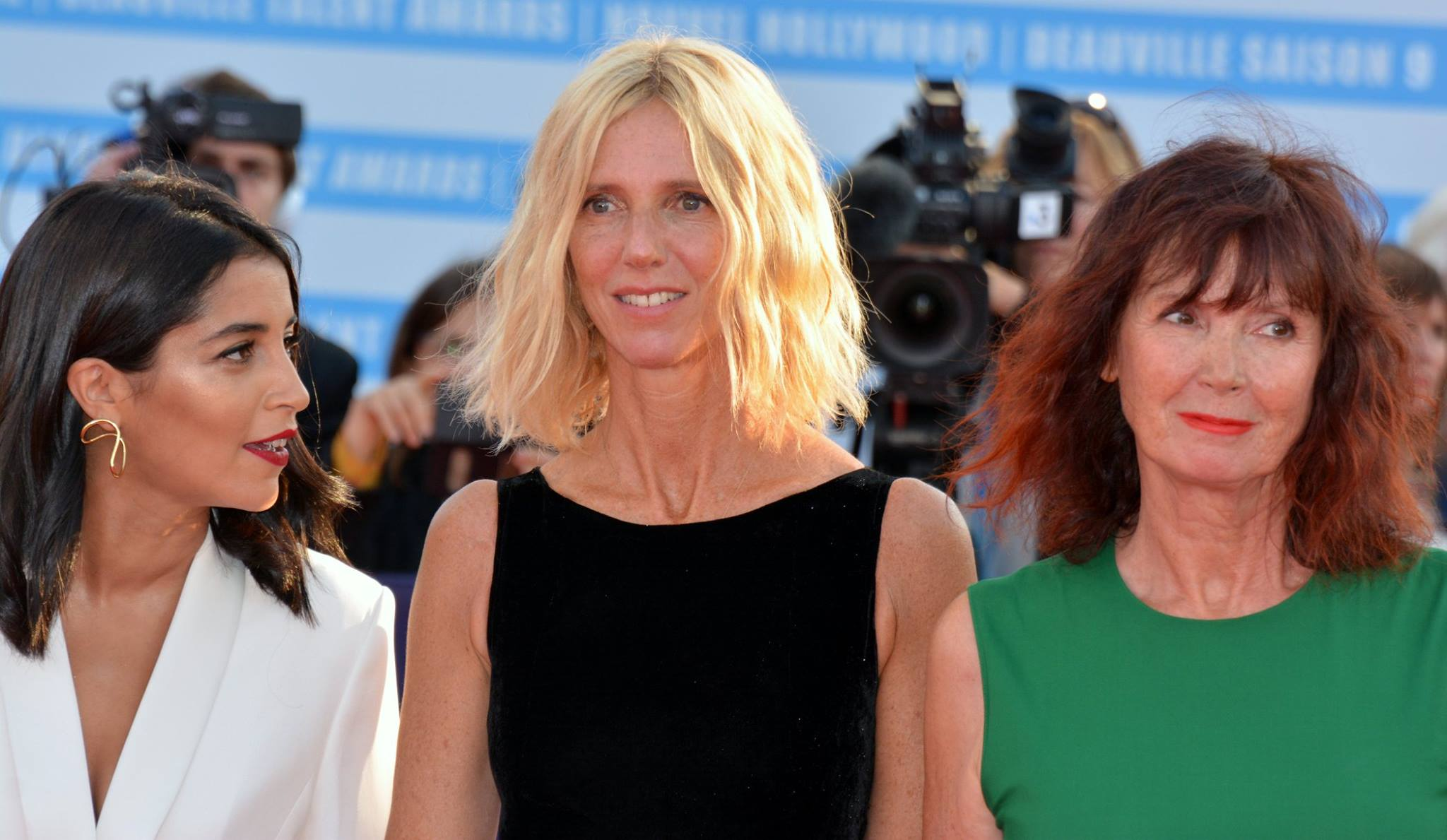 festival de Deauville